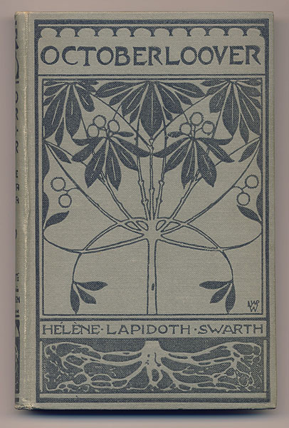 Boekomslag: Octoberloover. 1e druk 1903. Auteur: H. Lapidoth-Swarth. Bandontwerp: L.W.R. Wenckebach. Uitgeverij: P.N. van Kampen & Zoon